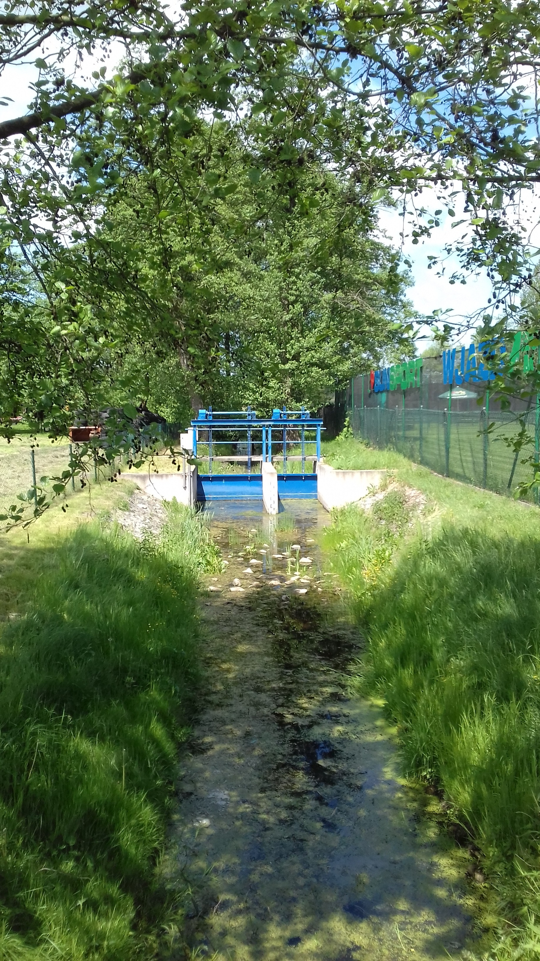 Śluza na Mesznie w Giewartowie.